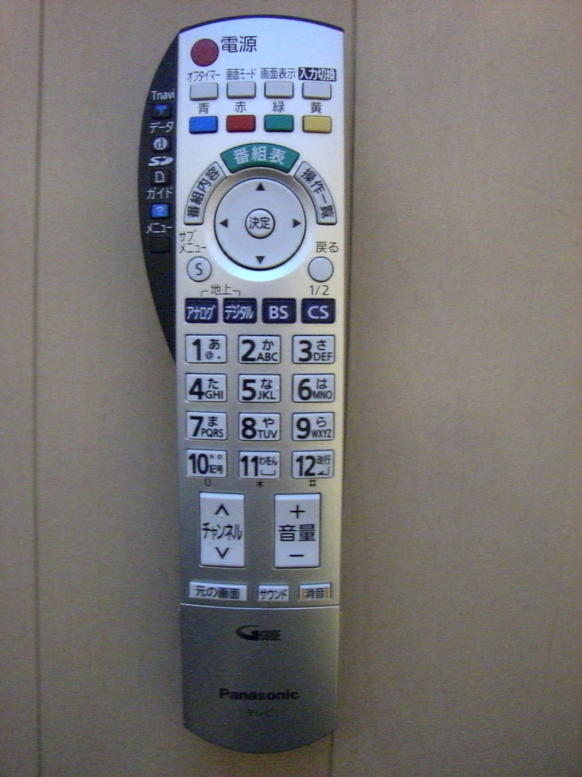 VIERAのらくらくリモコン